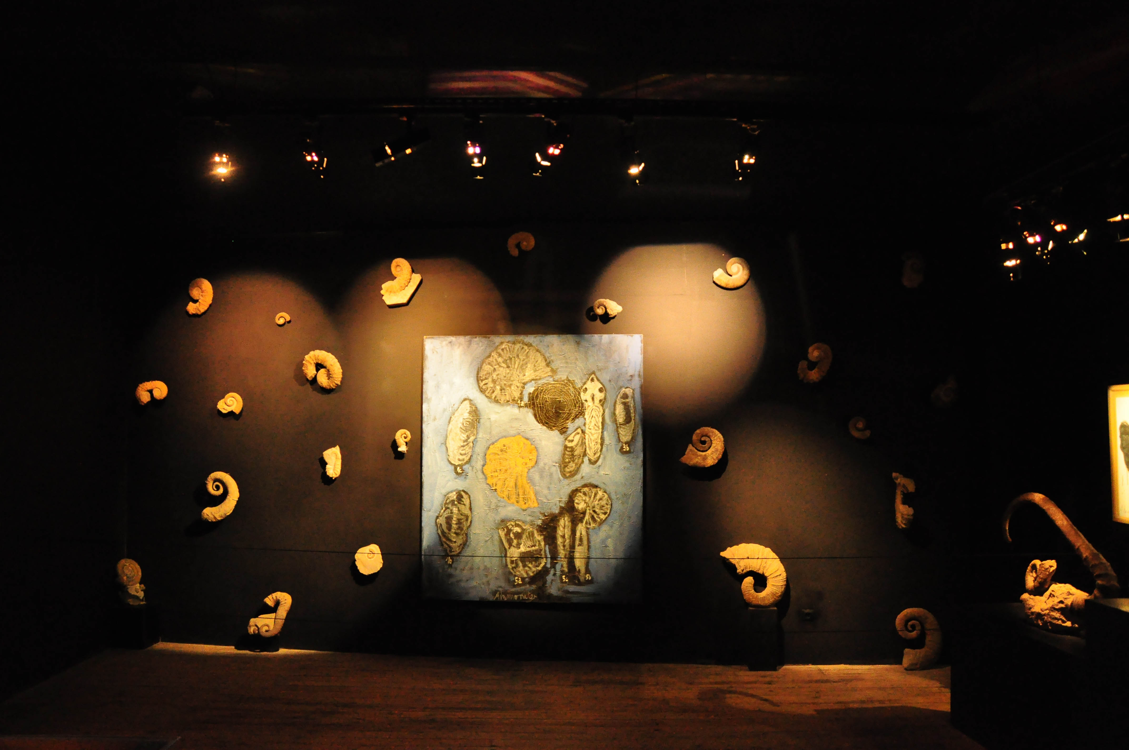 Différentes ammonites au musée de Digne